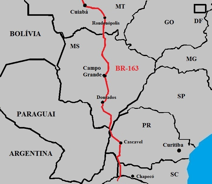 BR-163 - Trecho entre Cuiabá-MT e o Rio Grande do Sul